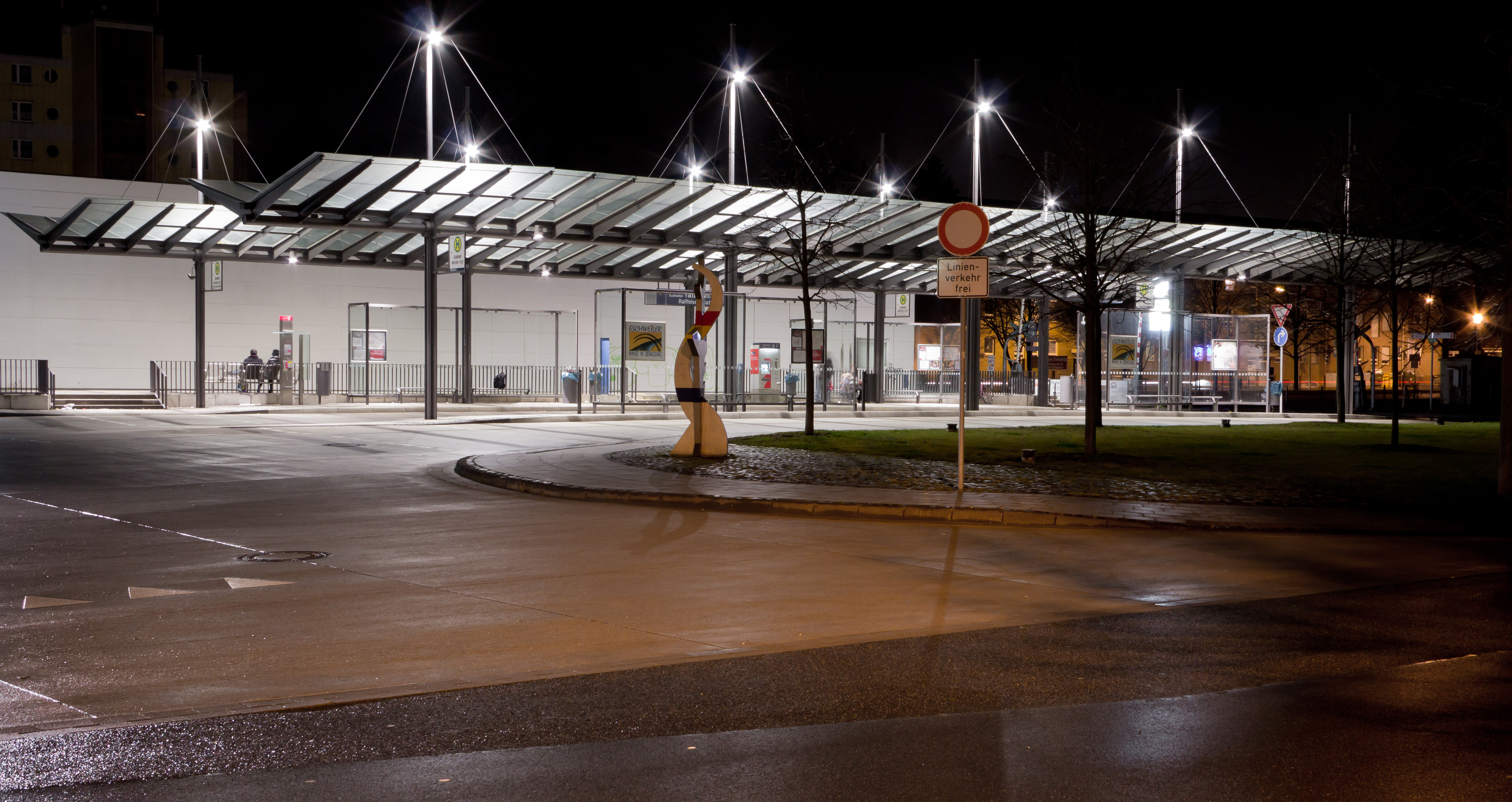 Der Eschweiler Talbahnhof, aufgenommen bei Nacht. Zu beachten sind die Lichteinrichtungen auf der Wiese, die früher, aufgrund des stetigen Betriebs dieser starken Lichtquellen, für Unmut bei den Anwohnern sorgten.